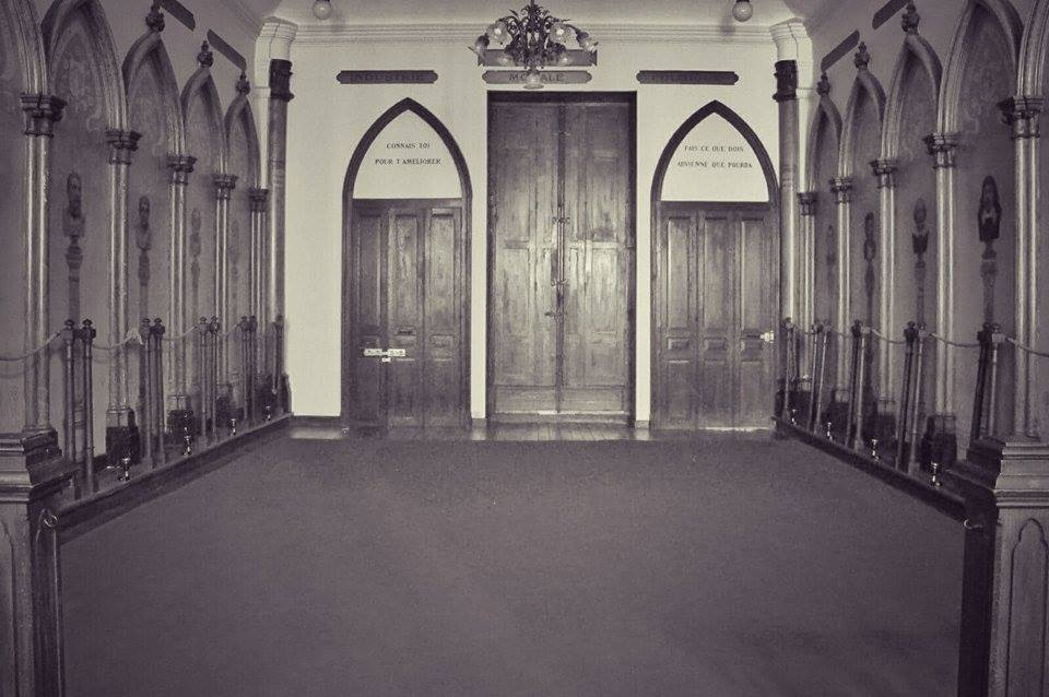 Chapelle de l'Humanité: le choeur et les murs vus de l'autel